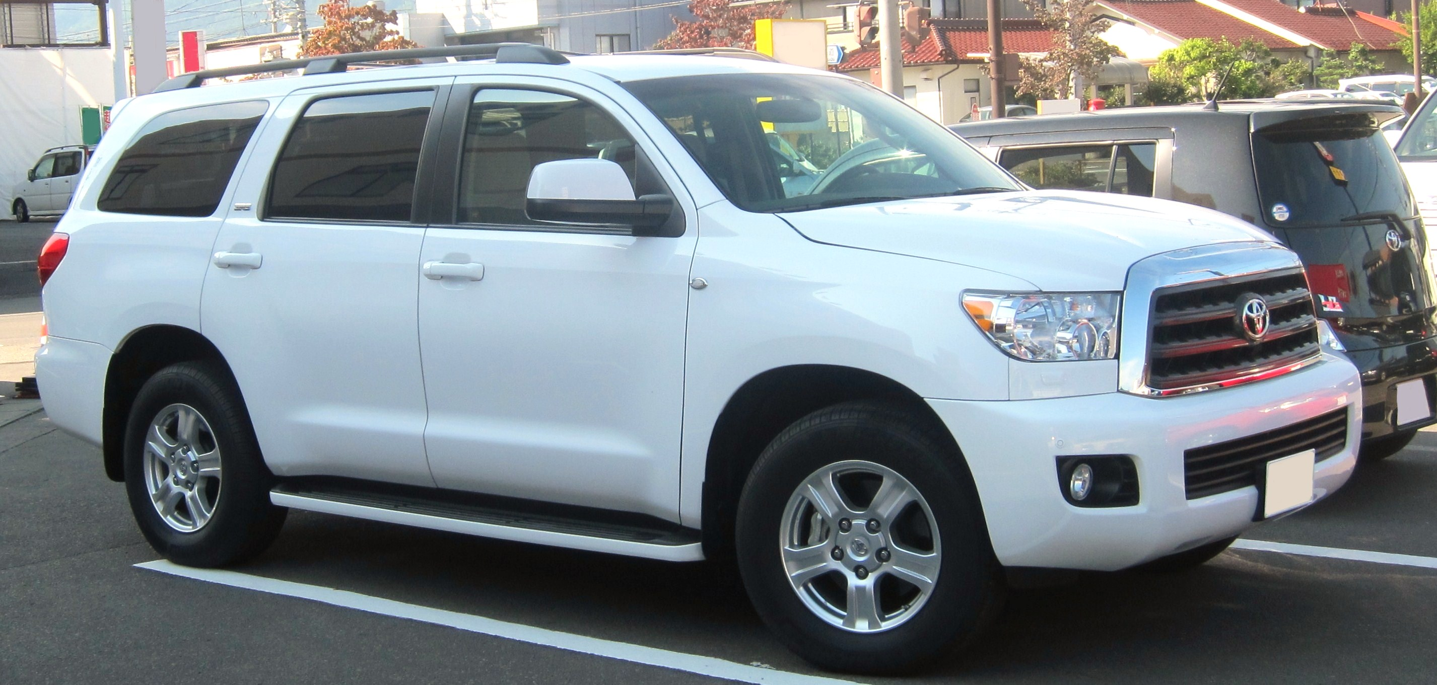 Toyota Sequoia